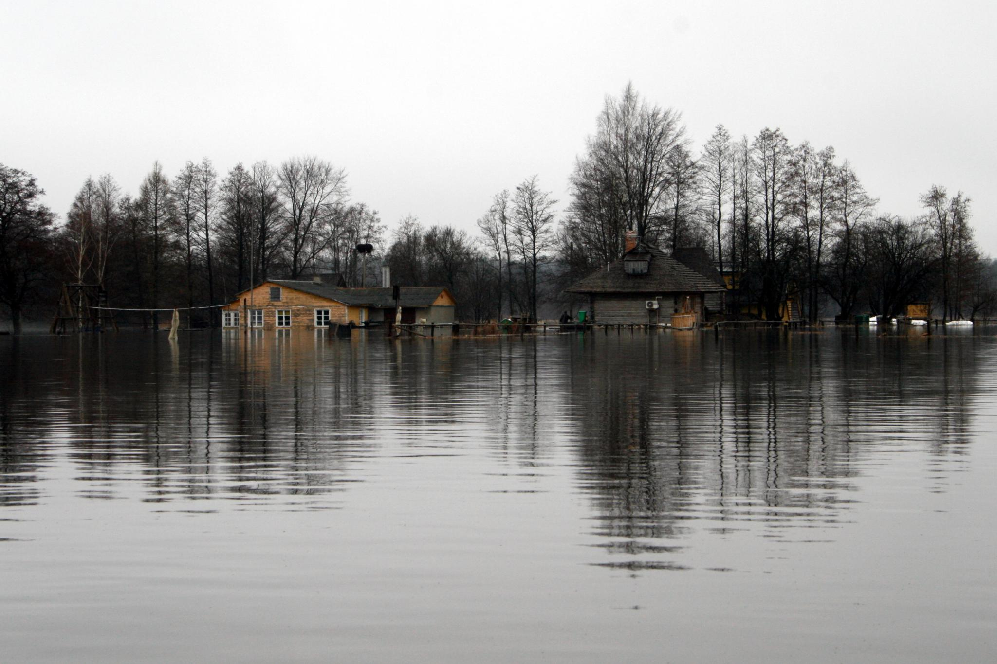 Soomaa National Park in Estonia.